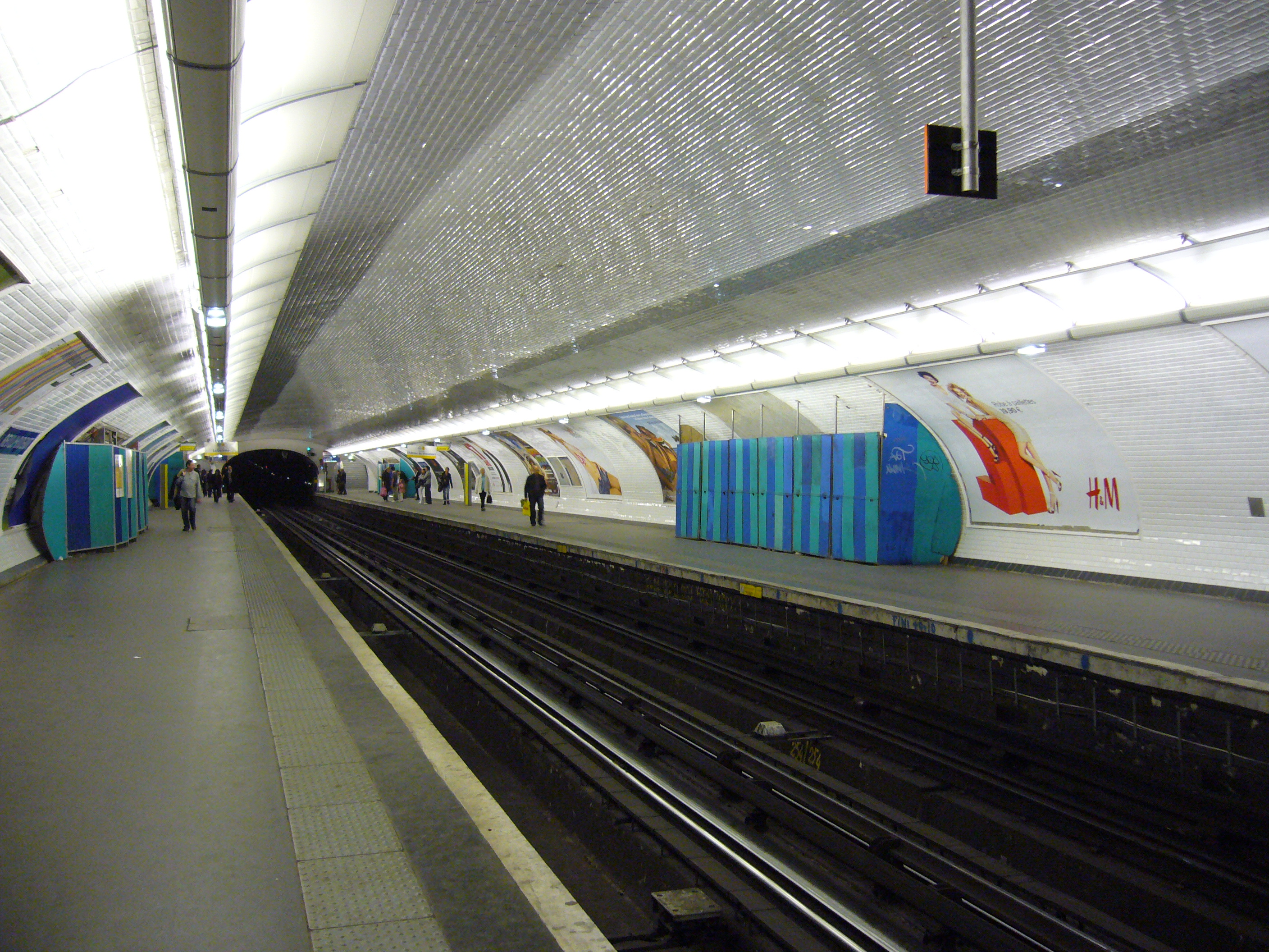 Les quais de la station Reuilly - Diderot sur la ligne 1 du métro de Paris.